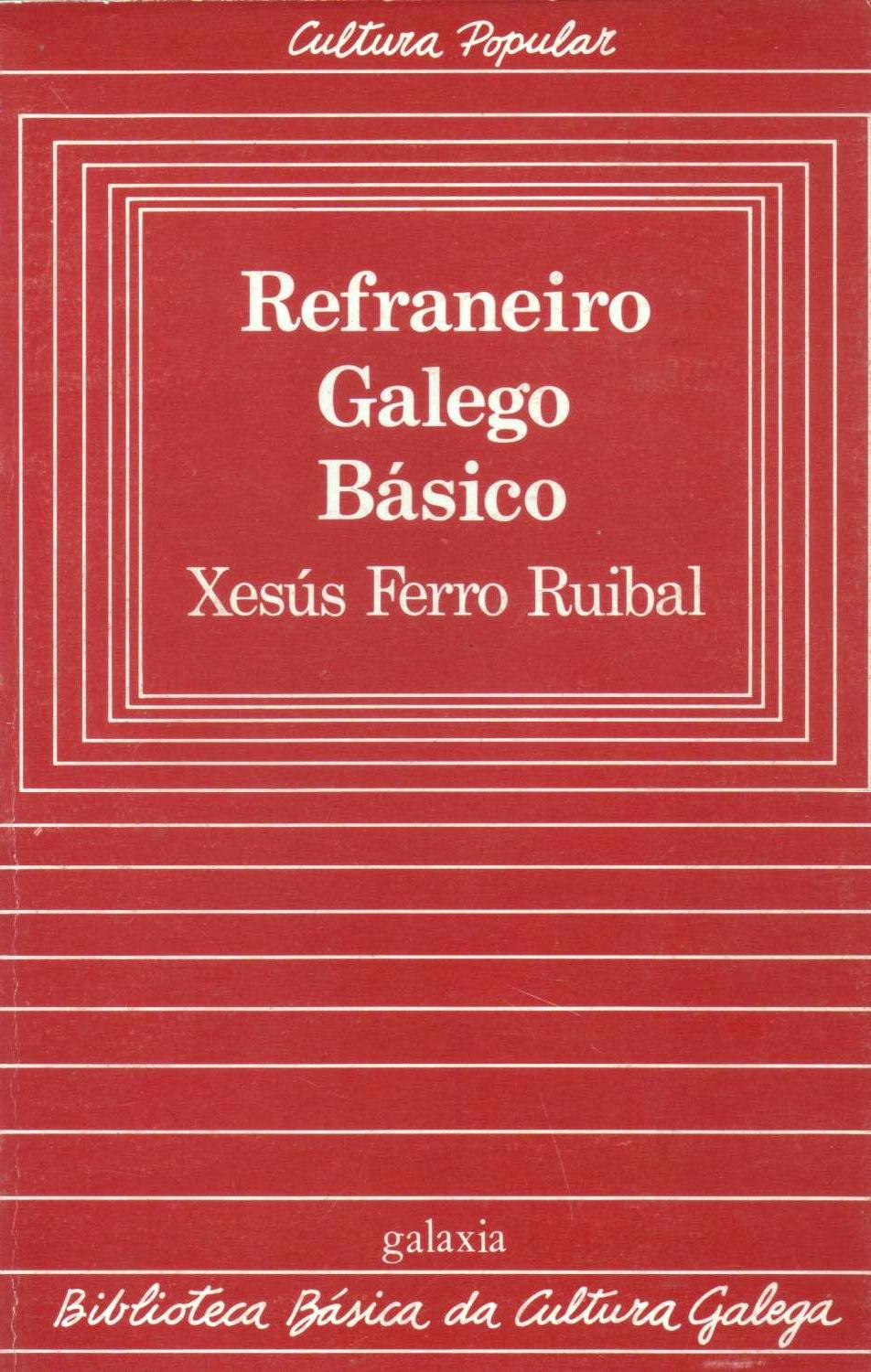 Biblioteca Básica da Cultura Galega, 16, Refraneiro galego básico, Xesús Ferro Ruibal.jpg